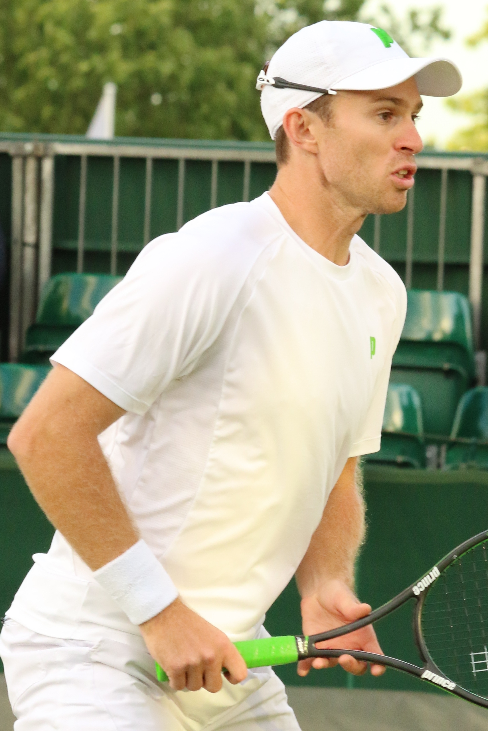 Peers WM16 (12)